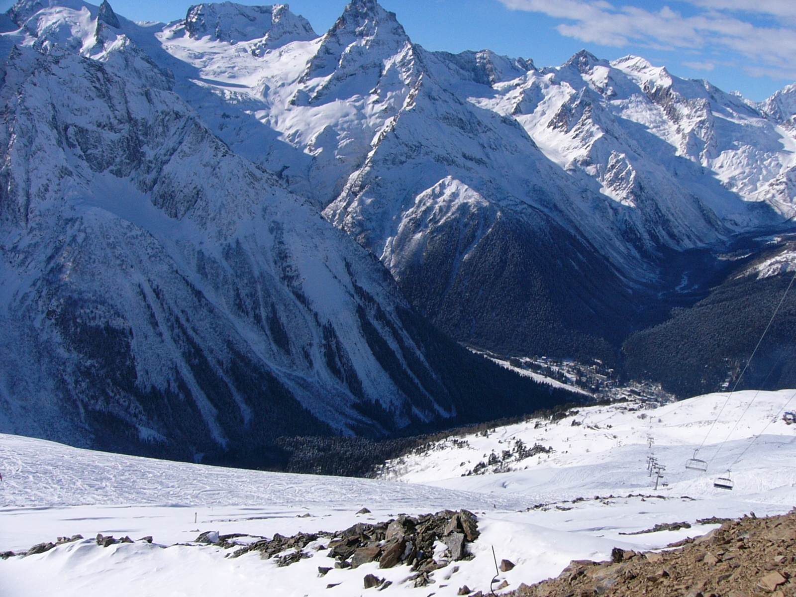 Внизу посёлок Домбай